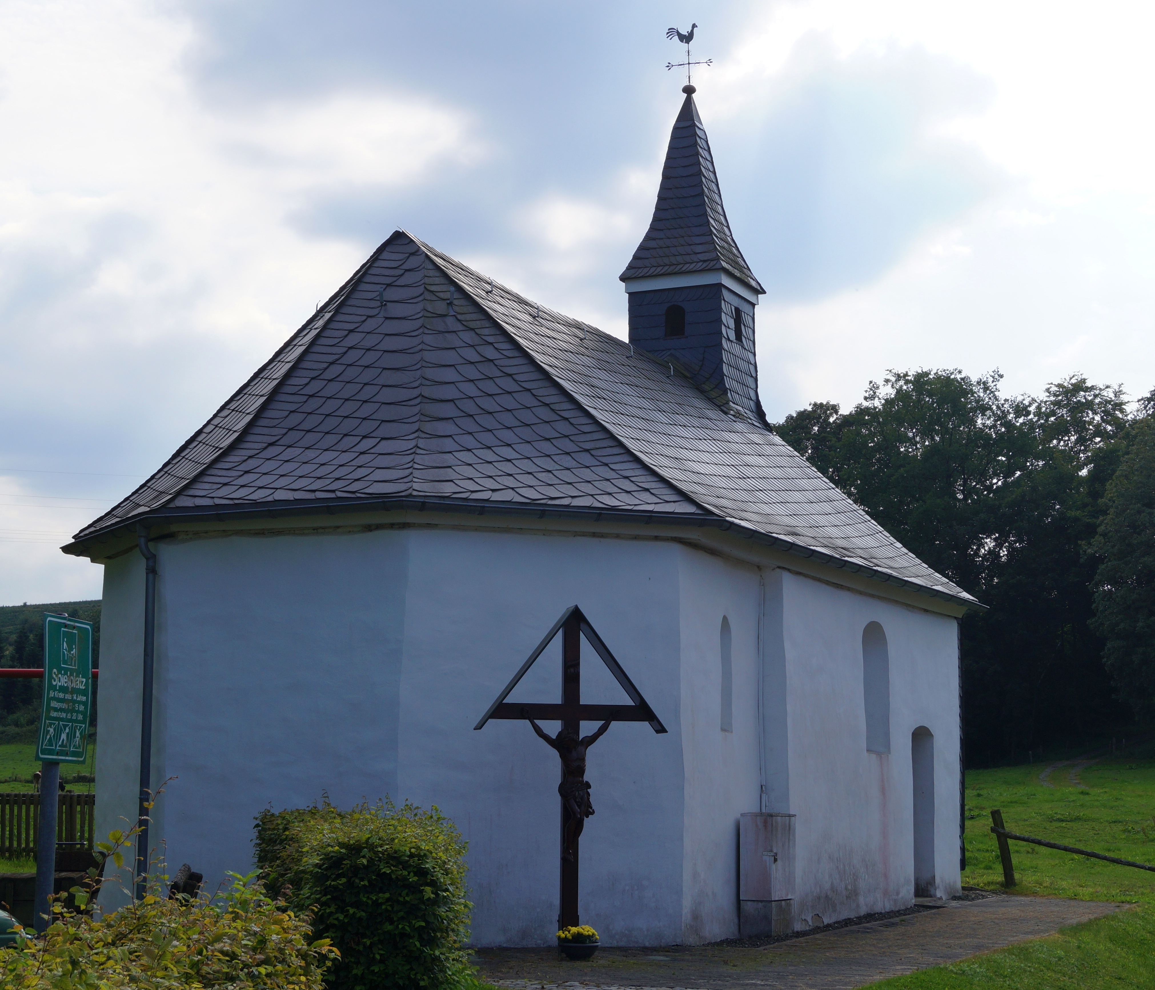 Schmallenberg-Kückelheim, denkmalgeschützte Kapelle St. Johannes der Täufer This is a photograph of an architectural monument.